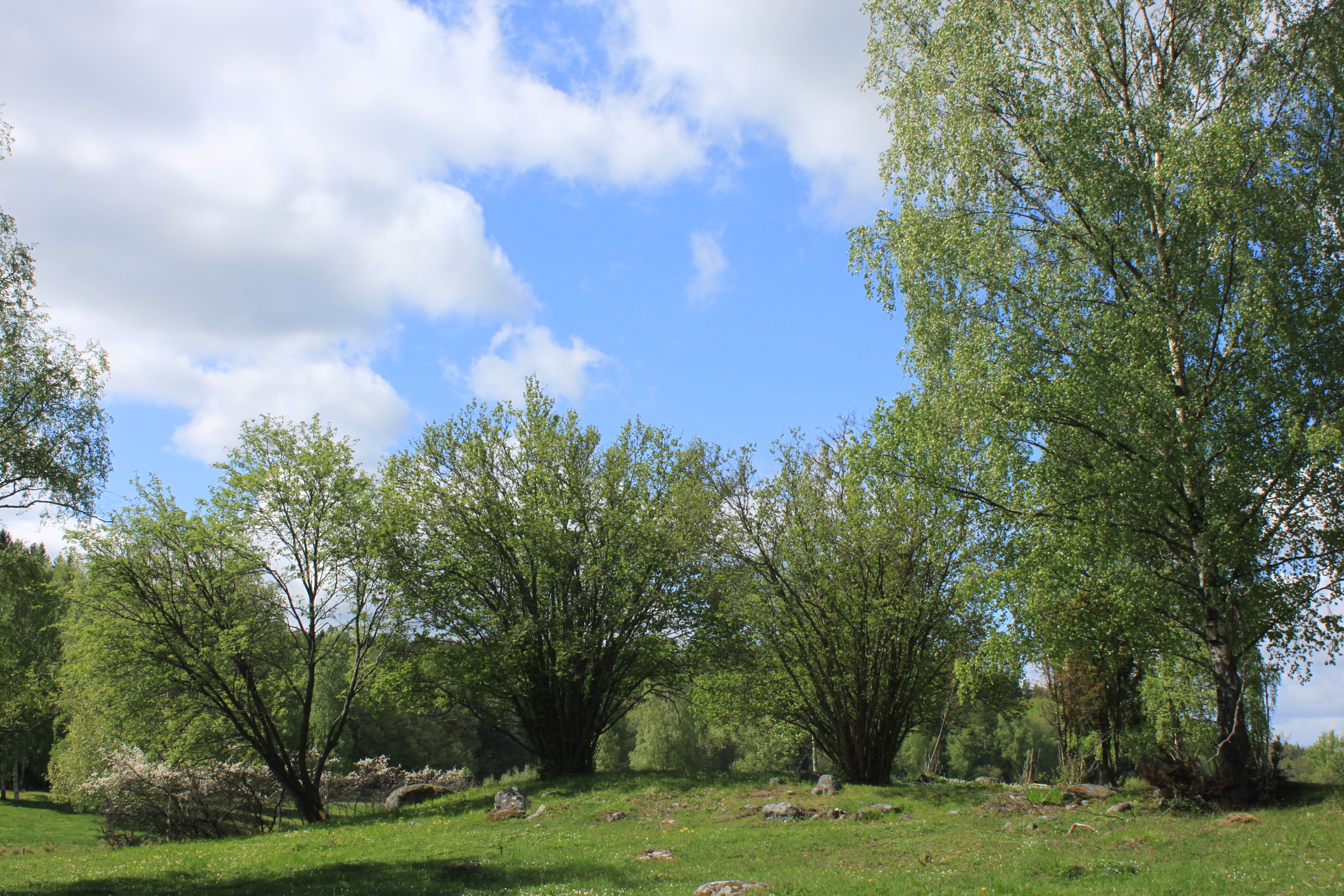 Äng i Öbacken-Bränninge naturreservat. 14 maj 2011.